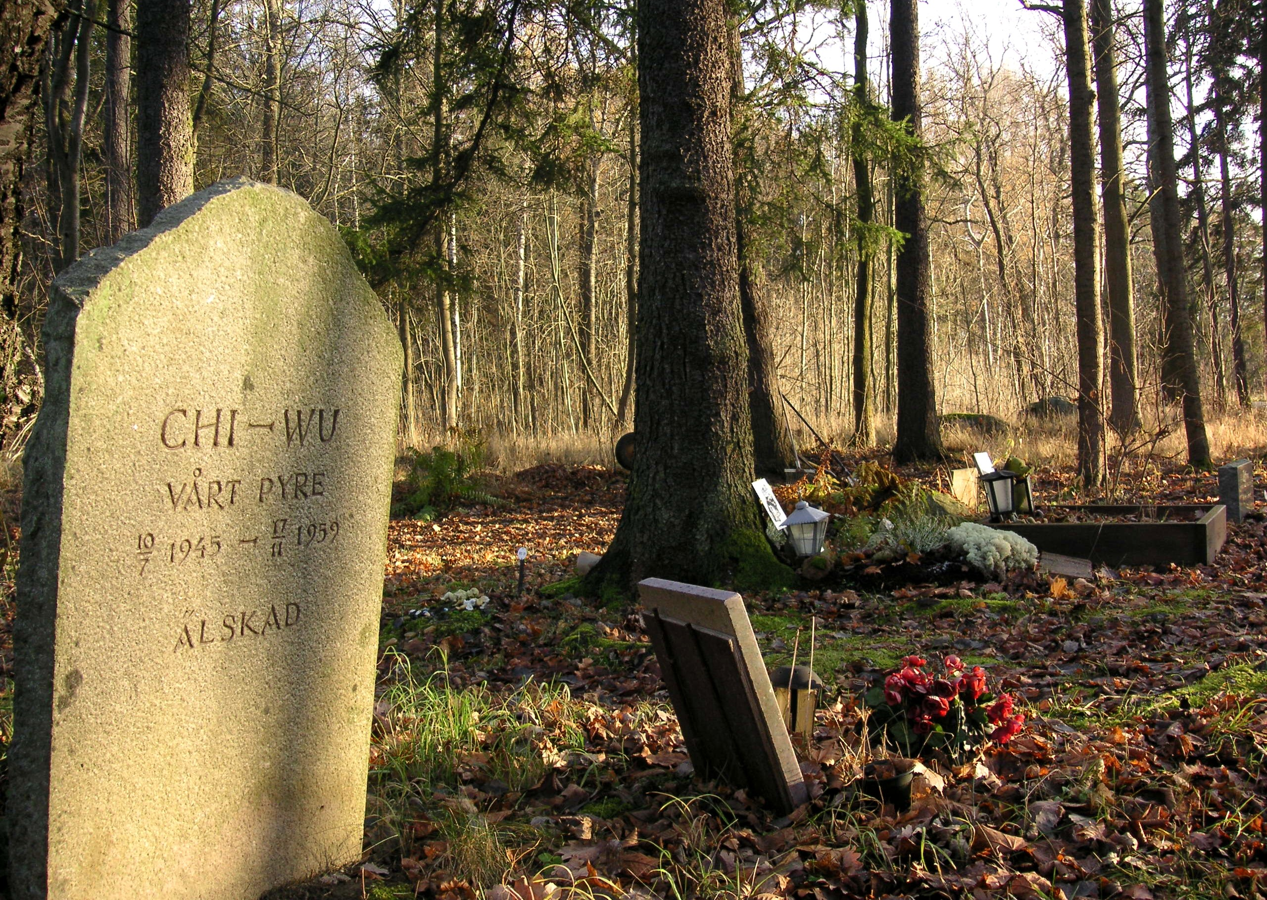 Kaknäs Djurkyrkogård, Gärdet, Stockholm